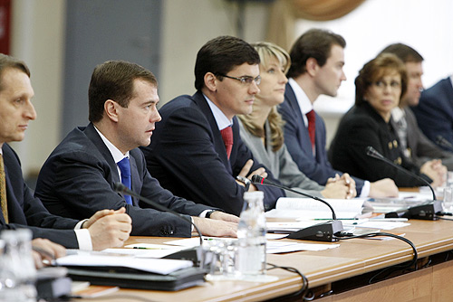 Aleksandr Vladimirovich Popov (also Alexander Popov